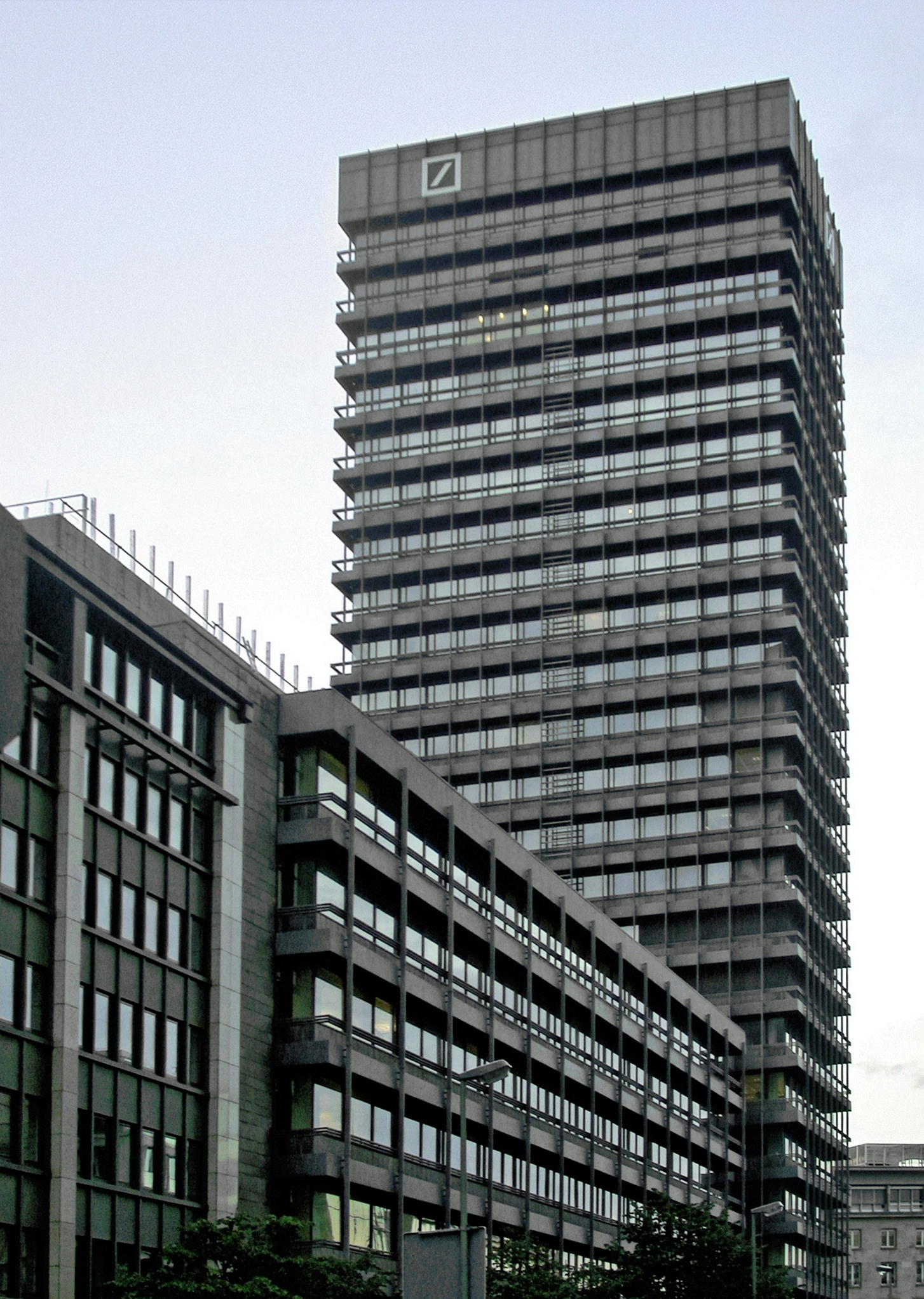 Deutsche Bank Hauptsitz 1971 Selbst fotografiert - Steht unter GFDL